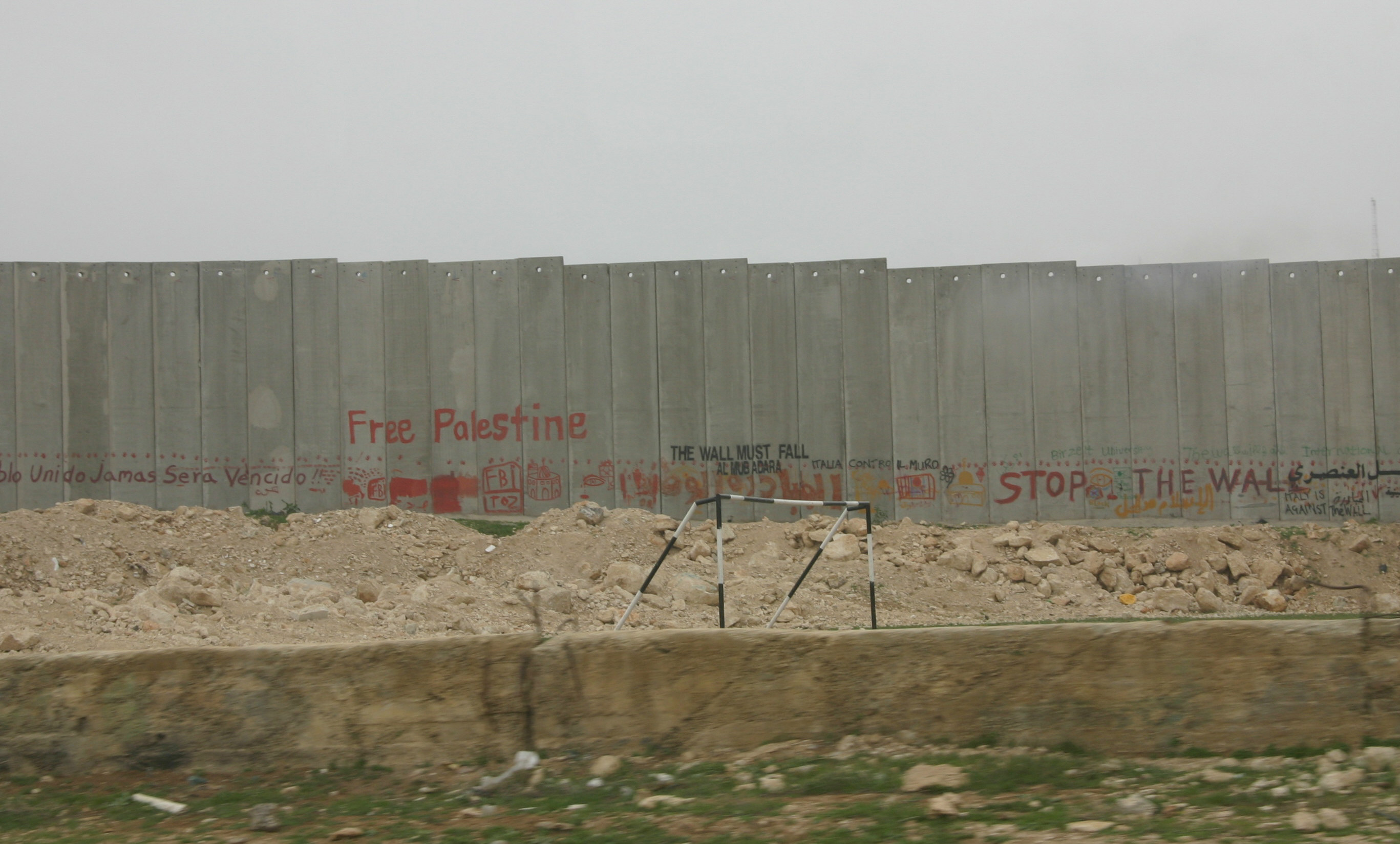 Fußballplatz in Abu Dis